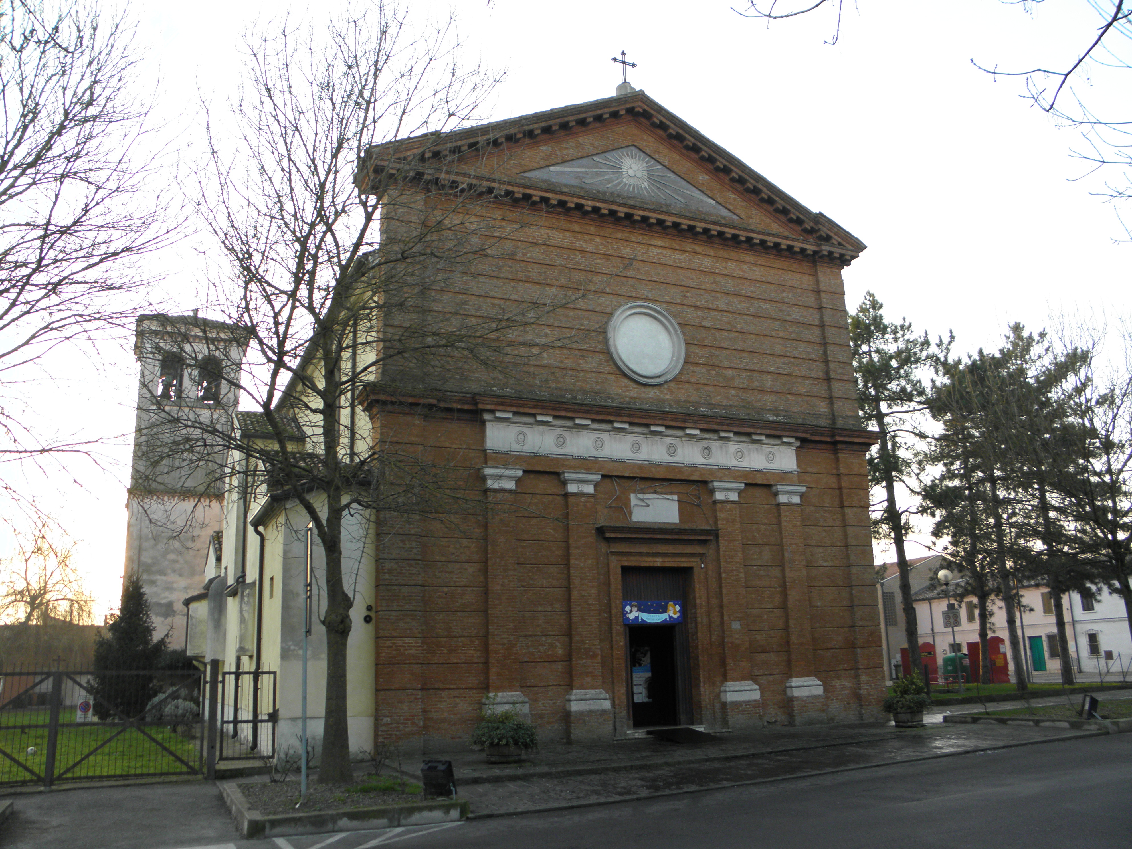 Migliaro, già comune autonomo e dal 2014 frazione di Fiscaglia: la chiesa parrocchiale della Natività di Maria Santissima (o semplicemente di Maria) della seconda metà del XVI secolo.